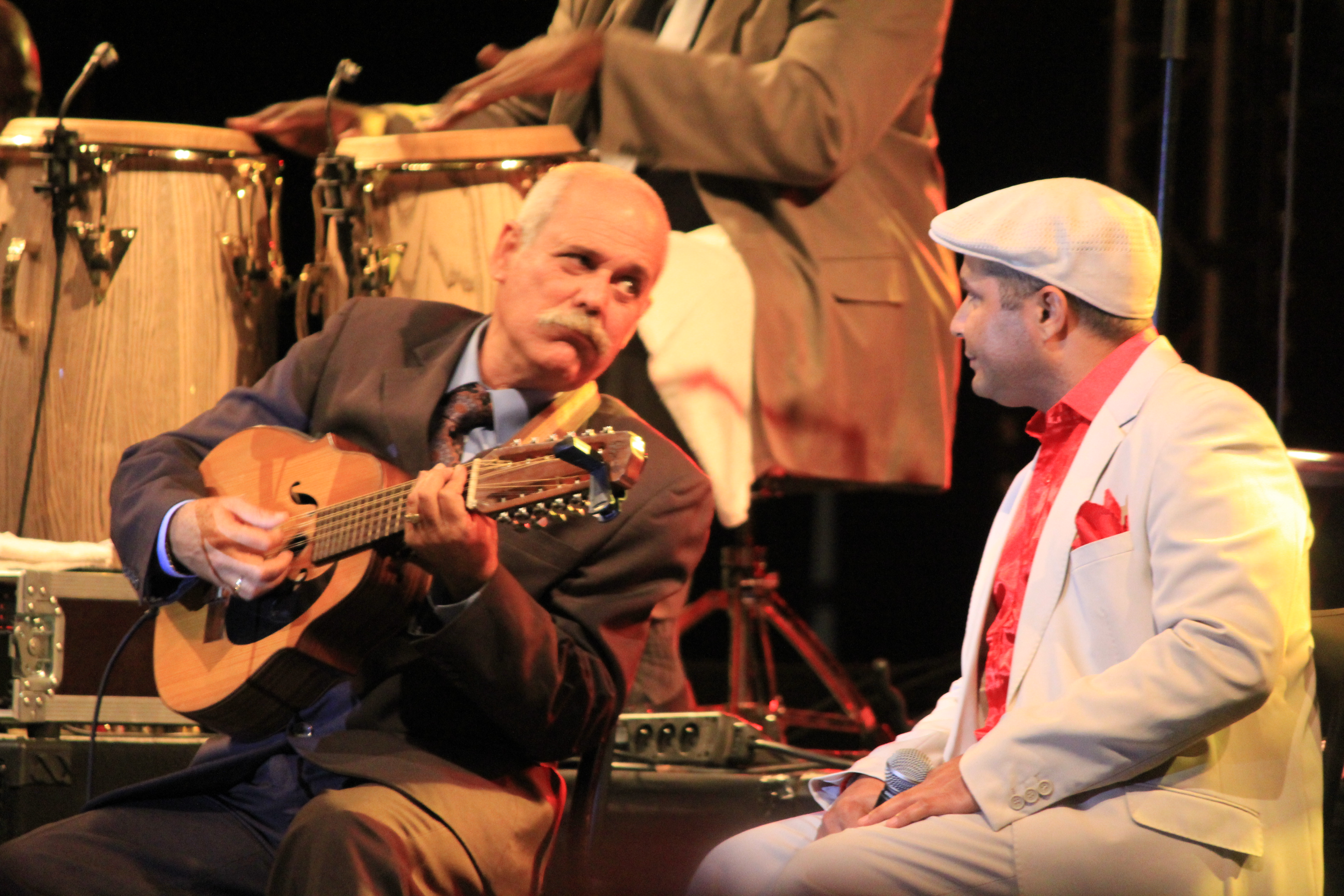 Orquesta Buena Vista Social Club pendant le Festival interceltique de Lorient avec Barbarito Torres